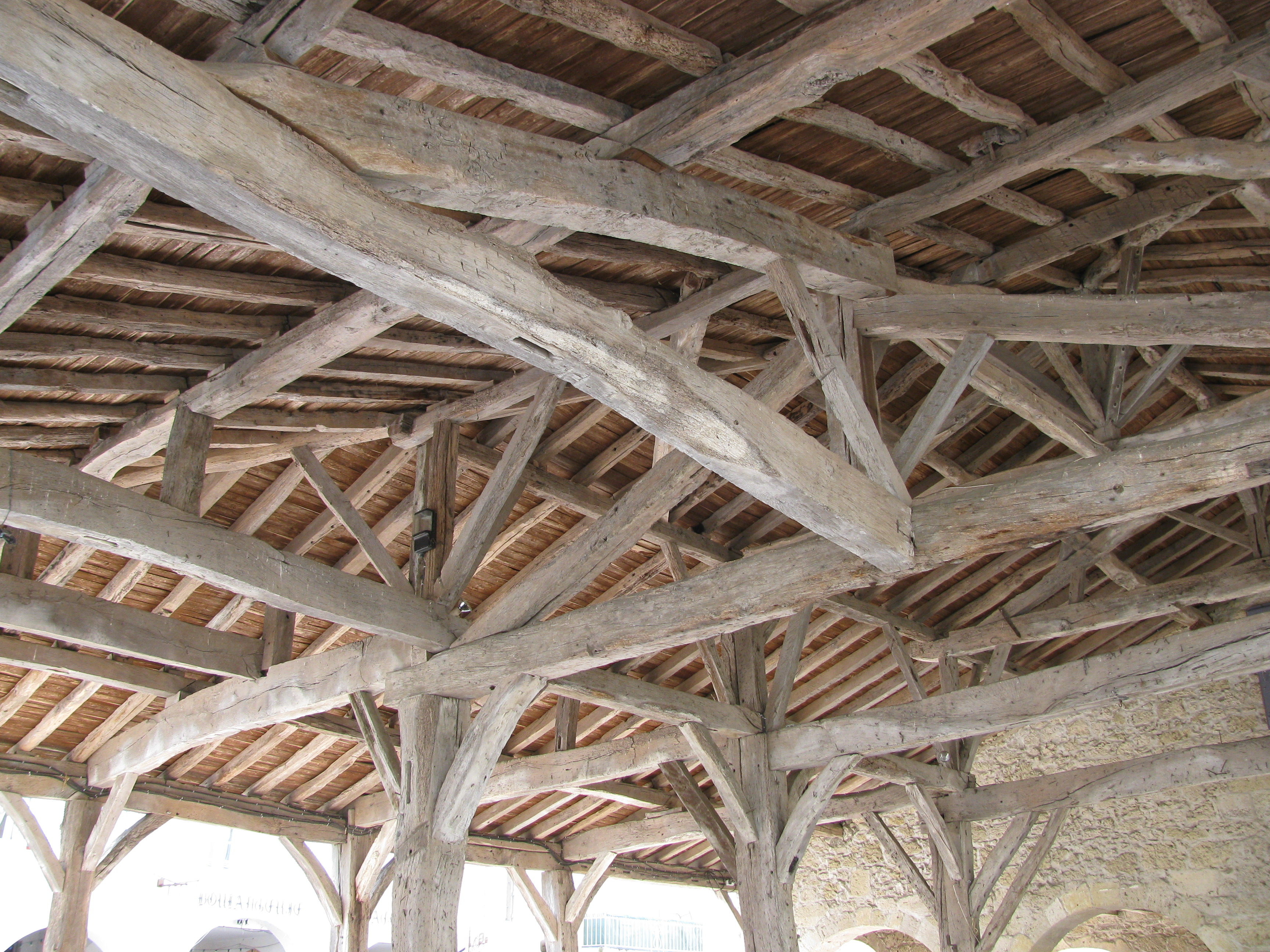 Saint-Clar : la Halle, intérieur, la charpente en bois